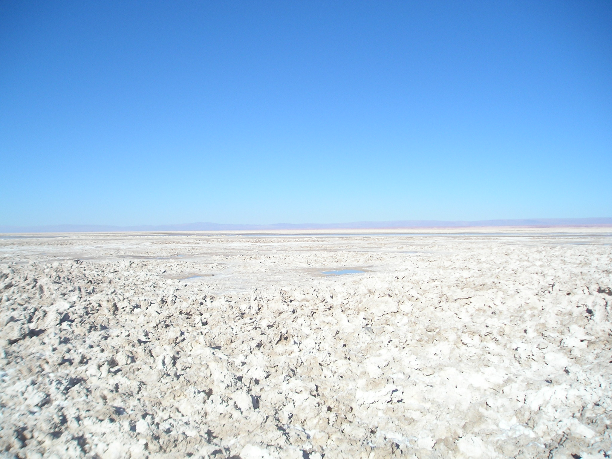 Salar de Atacama near Laguna Chaxa, south of San Pedro de Atacama, Chile